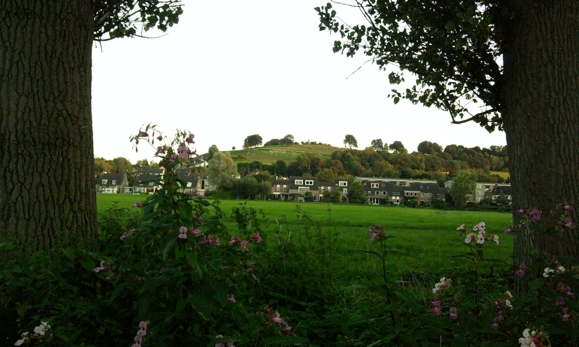 Uitzicht op de Gulperberg - Gulpen